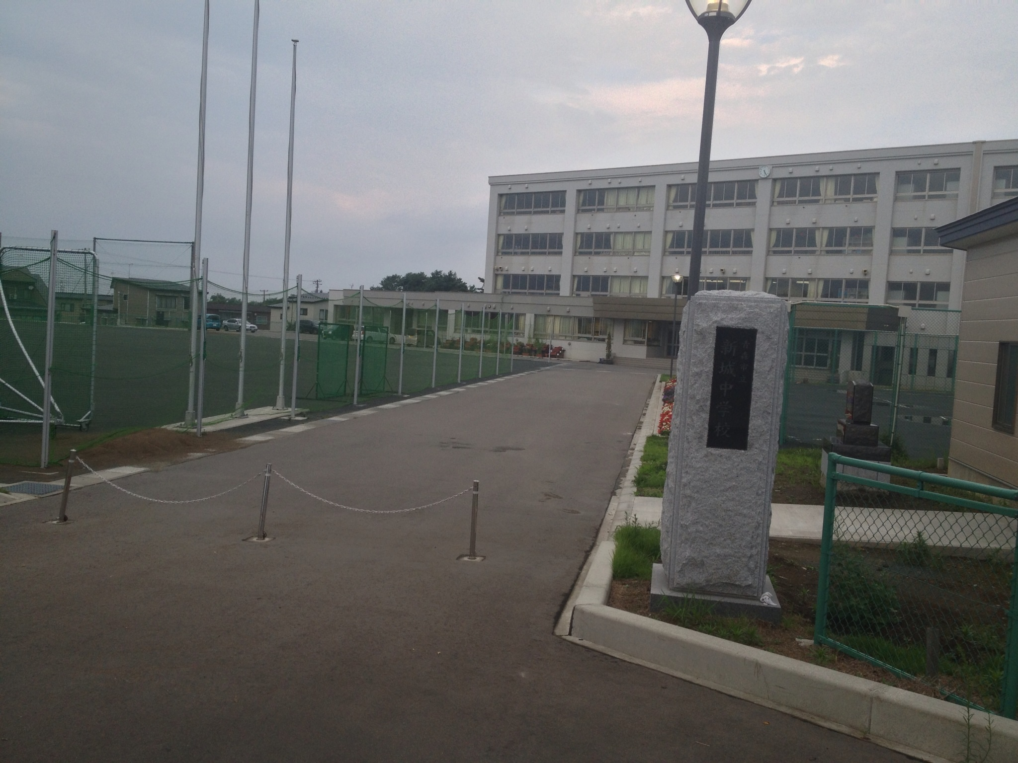 青森市立新城中学校2013年8月撮影